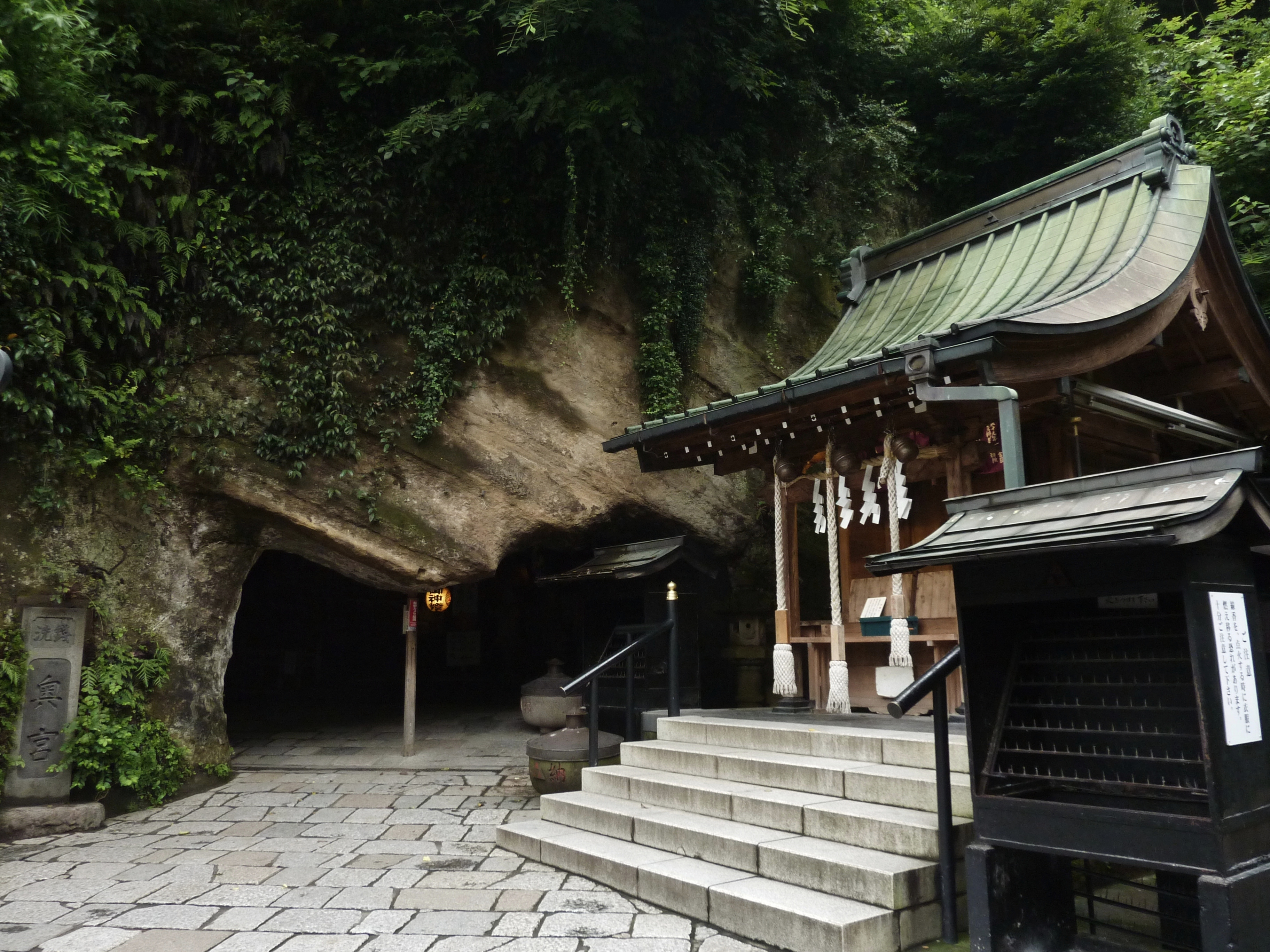 銭洗弁財天宇賀福神社（銭洗弁天）の奥宮と本宮（神奈川県鎌倉市）